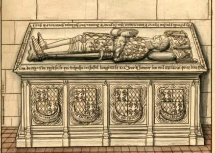 images collectées pour Gaignières se trouvant à la BNF numérisés par Gallica.